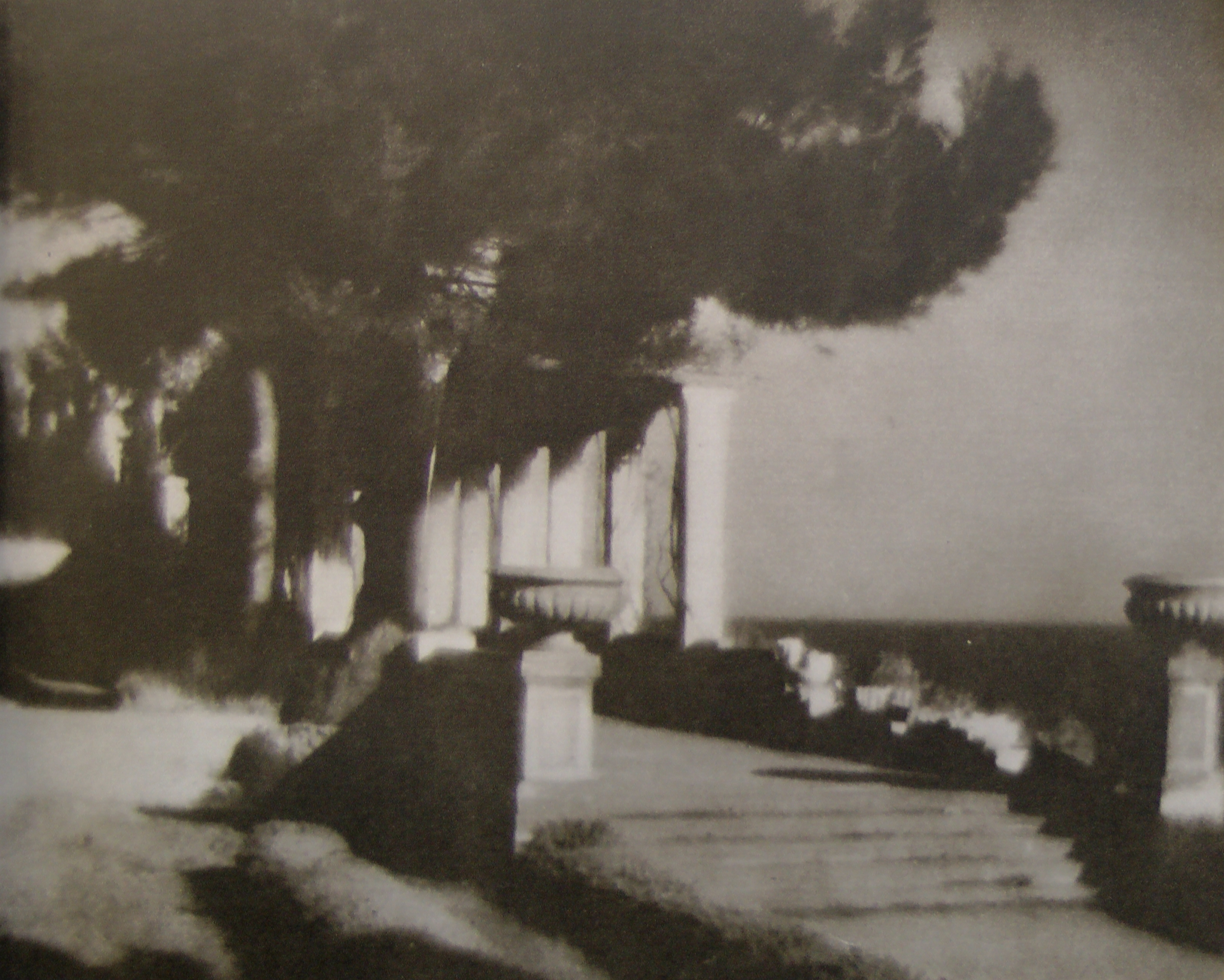 Юрий Еремин. Крым. Вилла на берегу моря, 1914